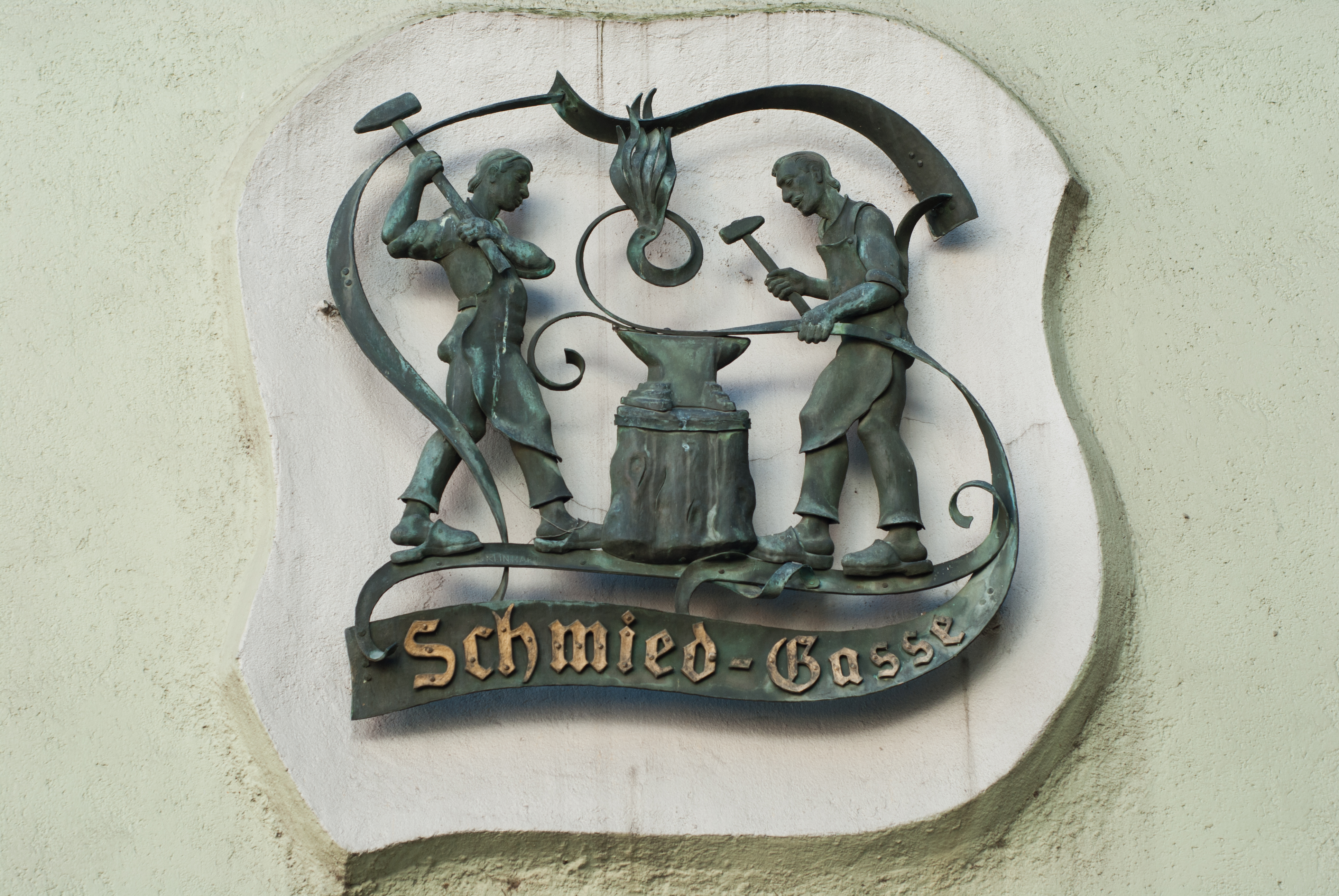 Künstlerische Darstellung der Schmiedgasse in Hall in Tirol, am Haus Unterer Stadtplatz 8